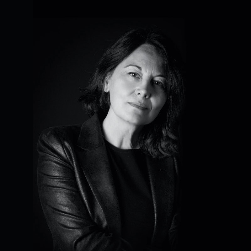 Mercedes De Vega